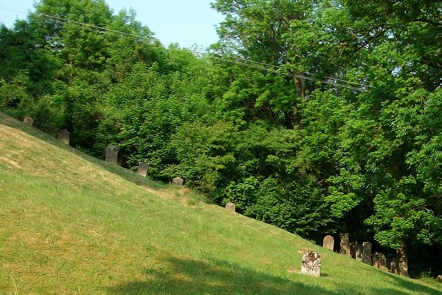 Obermarsberg - jüdischer Friedhof, Marsberg, Germany.